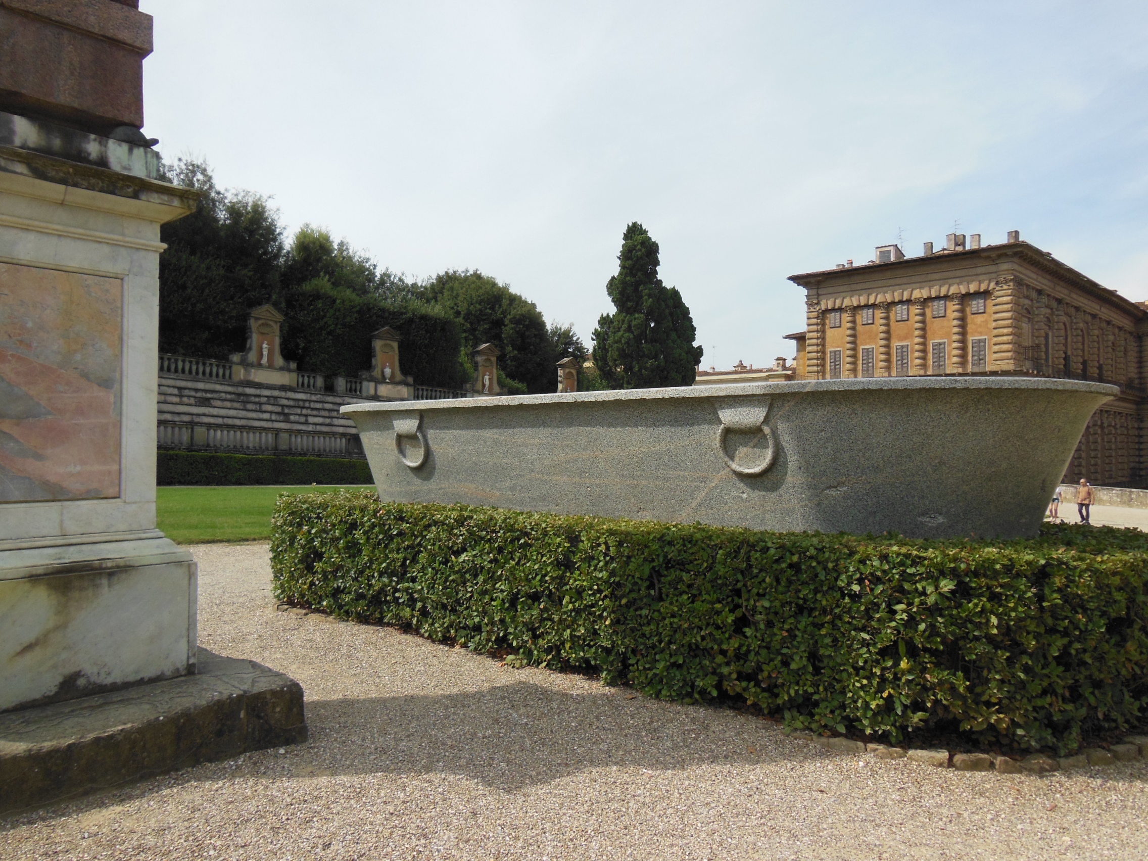 Italia, Firenze, Giardino di Boboli, Anfiteatro, vasca di granito proveniente da Roma, forse dalle terme Alessandrine